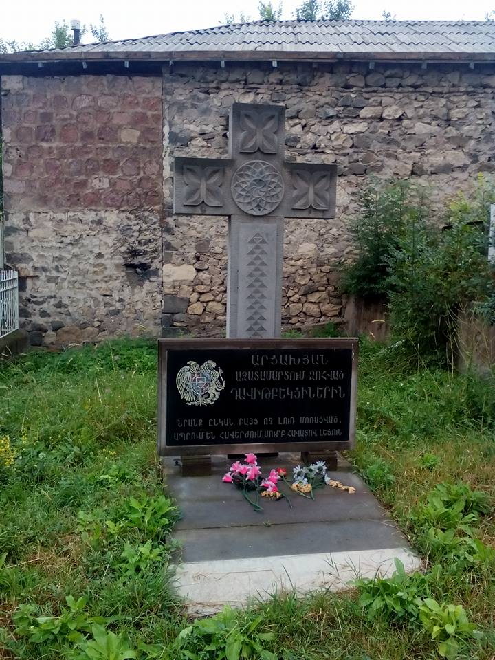 Արցախյան ազատամարտում զոհված դավիթբեկցիներին նվիրված հուշաքարը